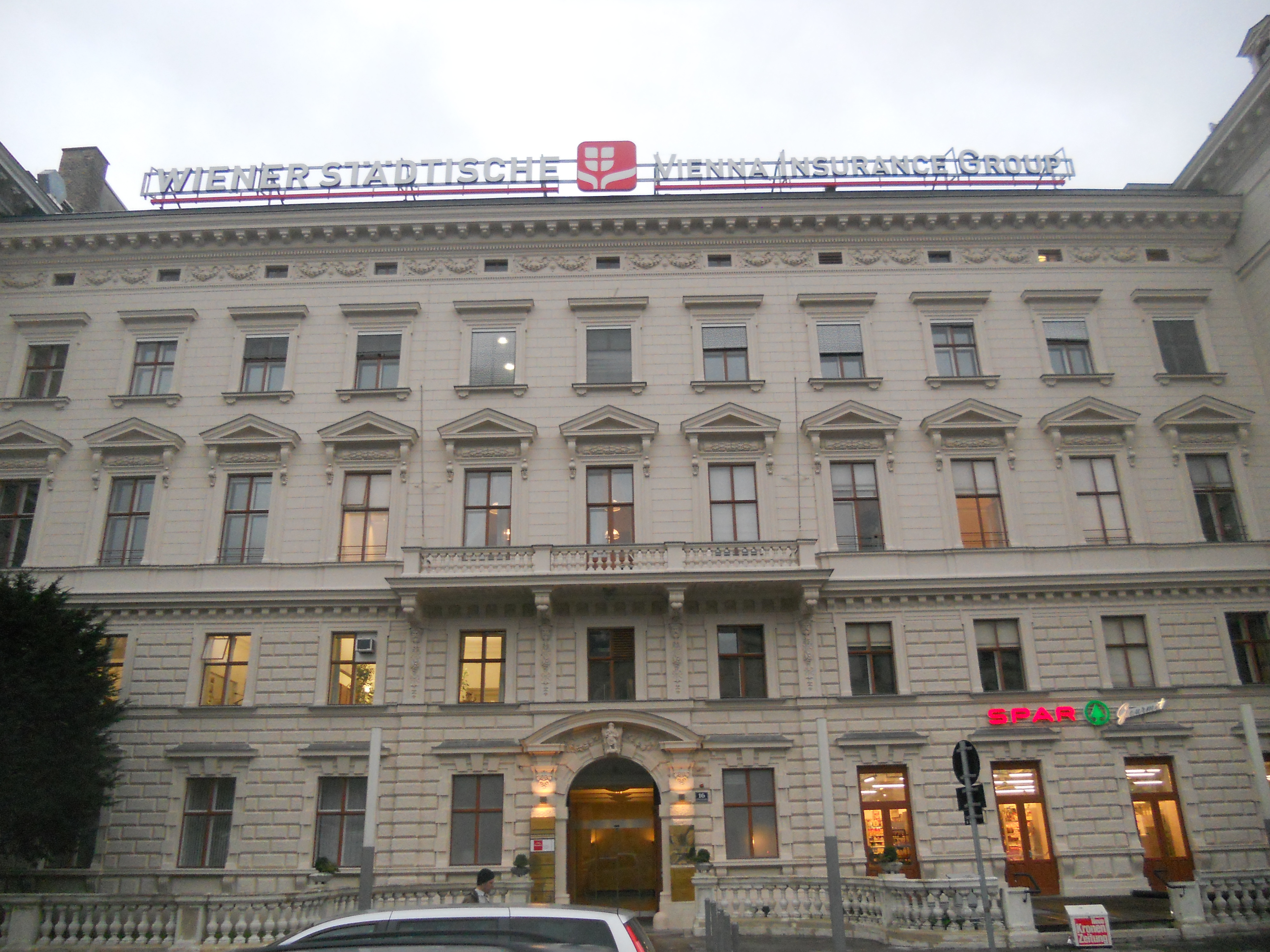 Wohnhaus Wertheim, ehem. Hotel Majestic